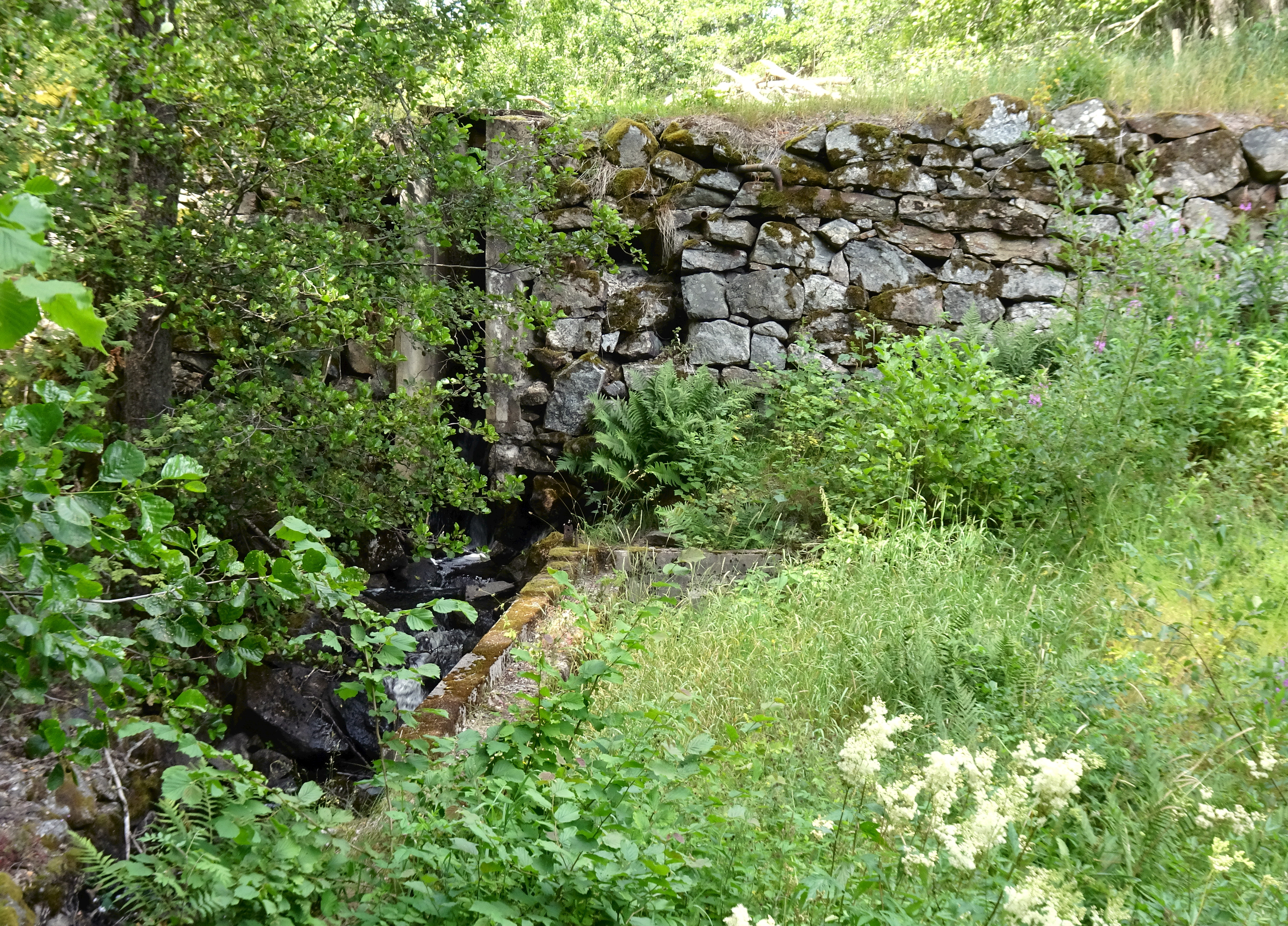 Dammen och grunden efter Åva kvarn